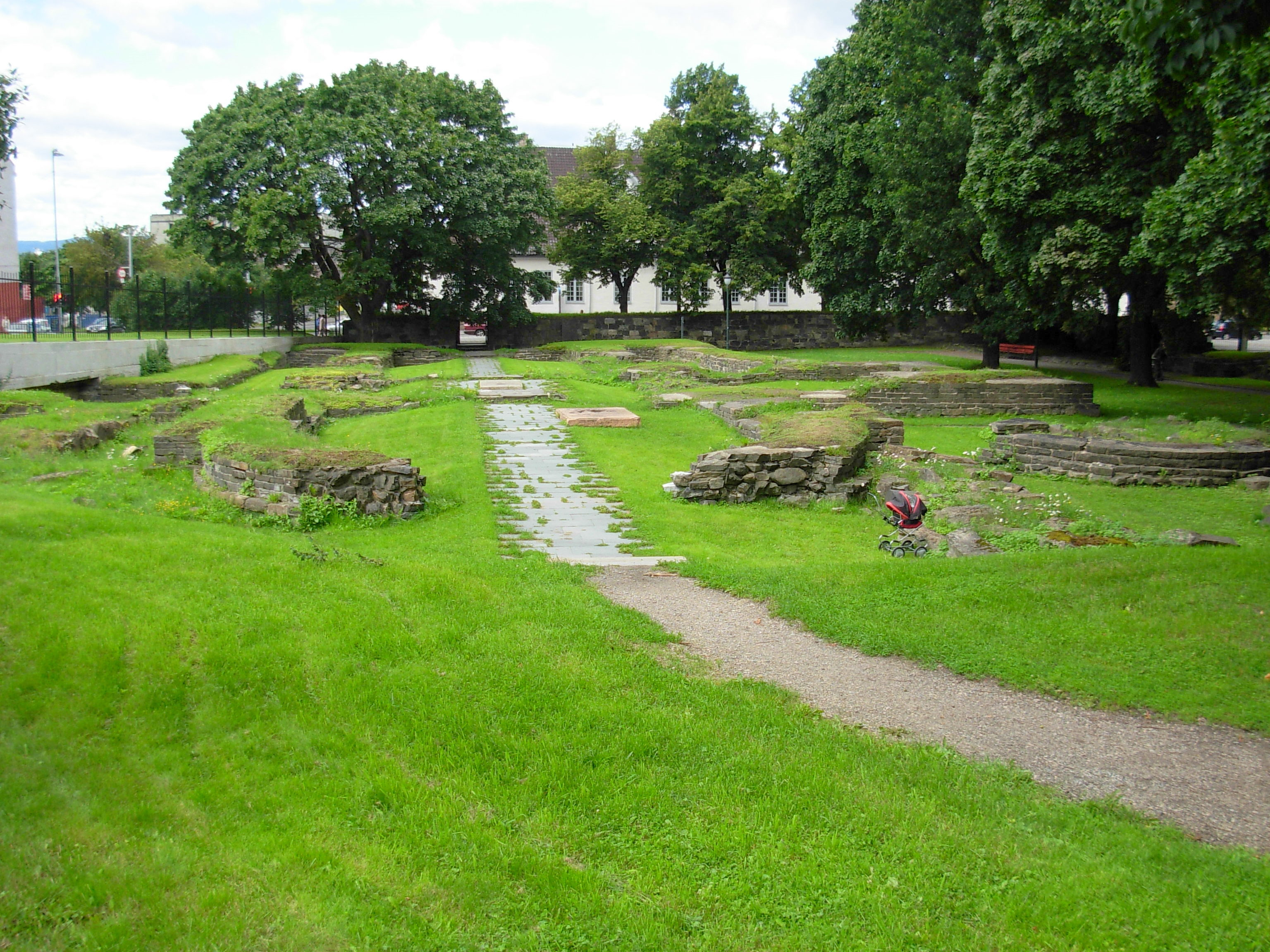 Ruinparken, Gamlebyen, Oslo, med ruiner av Hallvardskirken